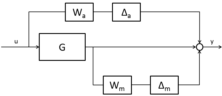 Dynamische Unsicherheiten in additiver und multiplikativer Form